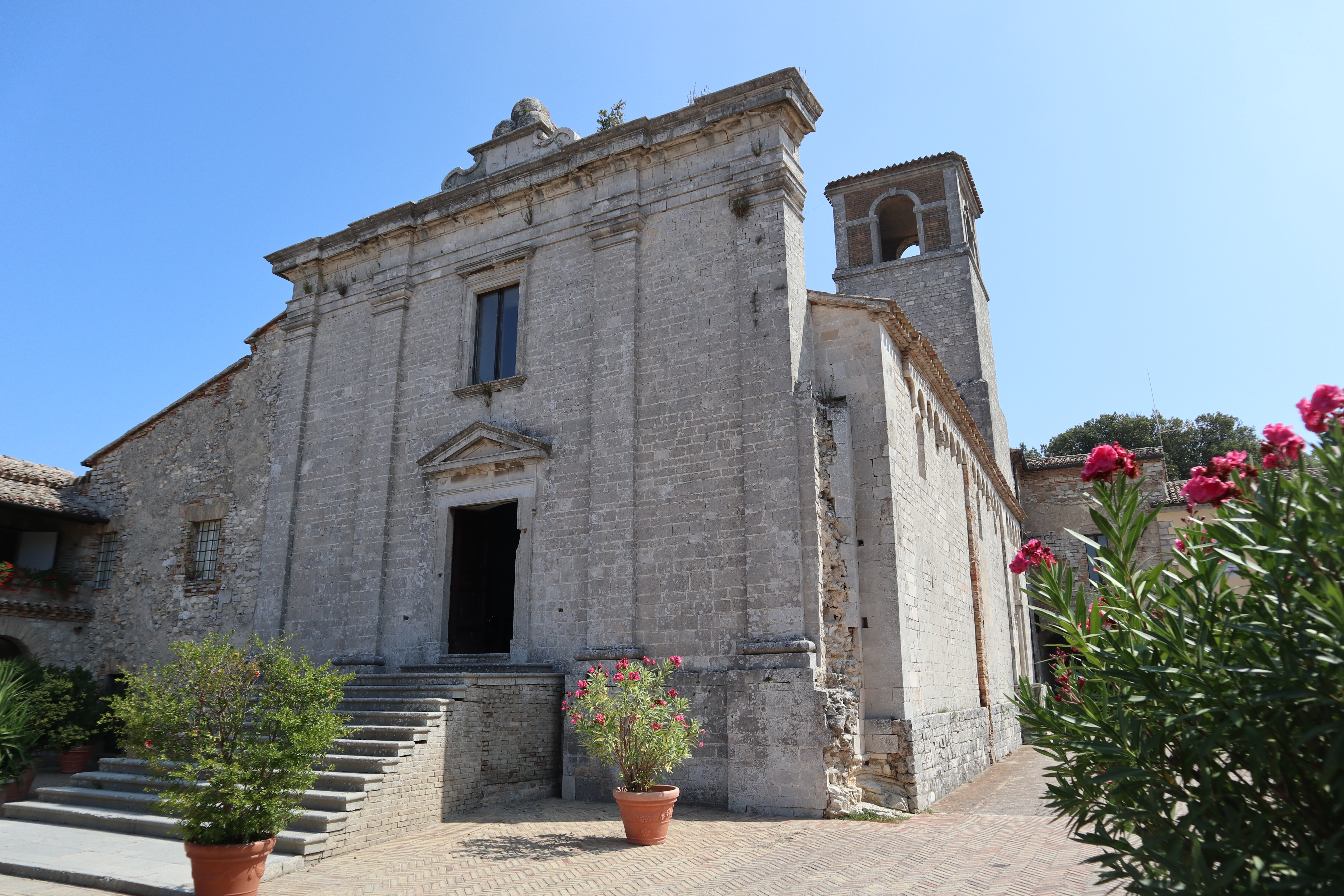 La chiesa